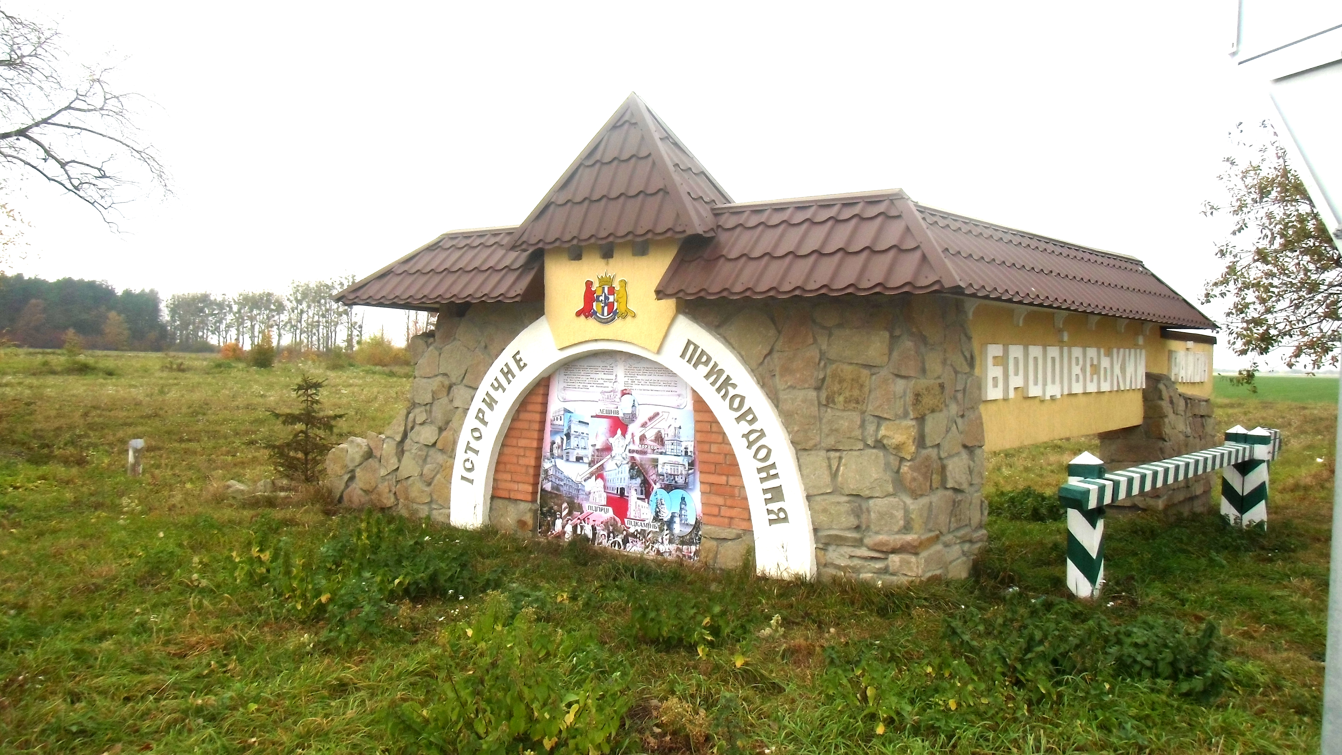 Brodivs'kyi district, Lviv Oblast, Ukraine